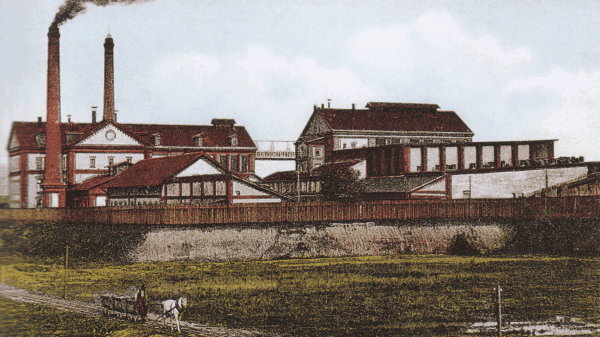 Ostrava, český akciový pivovar v Moravské Ostravě